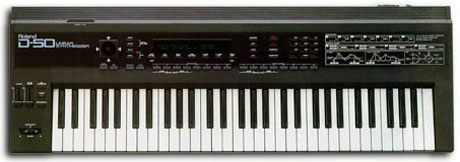 sintetizzatore Roland D-50 Licensing Categoria:Sintetizzatori Categoria:Sintetizzatori Roland